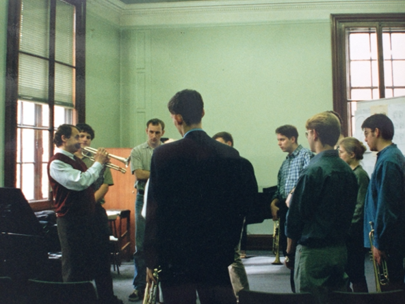 Владимир Пушкарев проводит мастер-класс в Королевской академии музыки в Лондоне